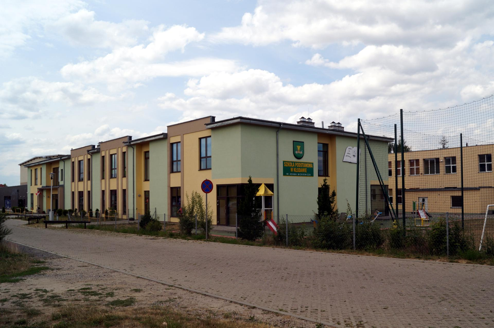 Szkoła Podstawowa w Kłodawie